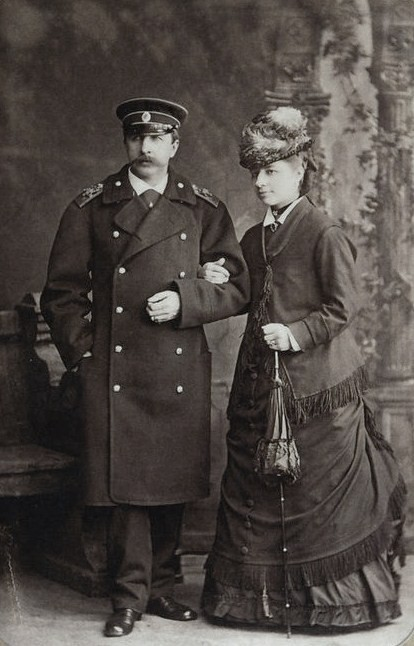 Дмитрий Сергеевия Арсеньев (1832—1915) с женой Варварой Владимировной, ур. Скарятиной (1844—1906)